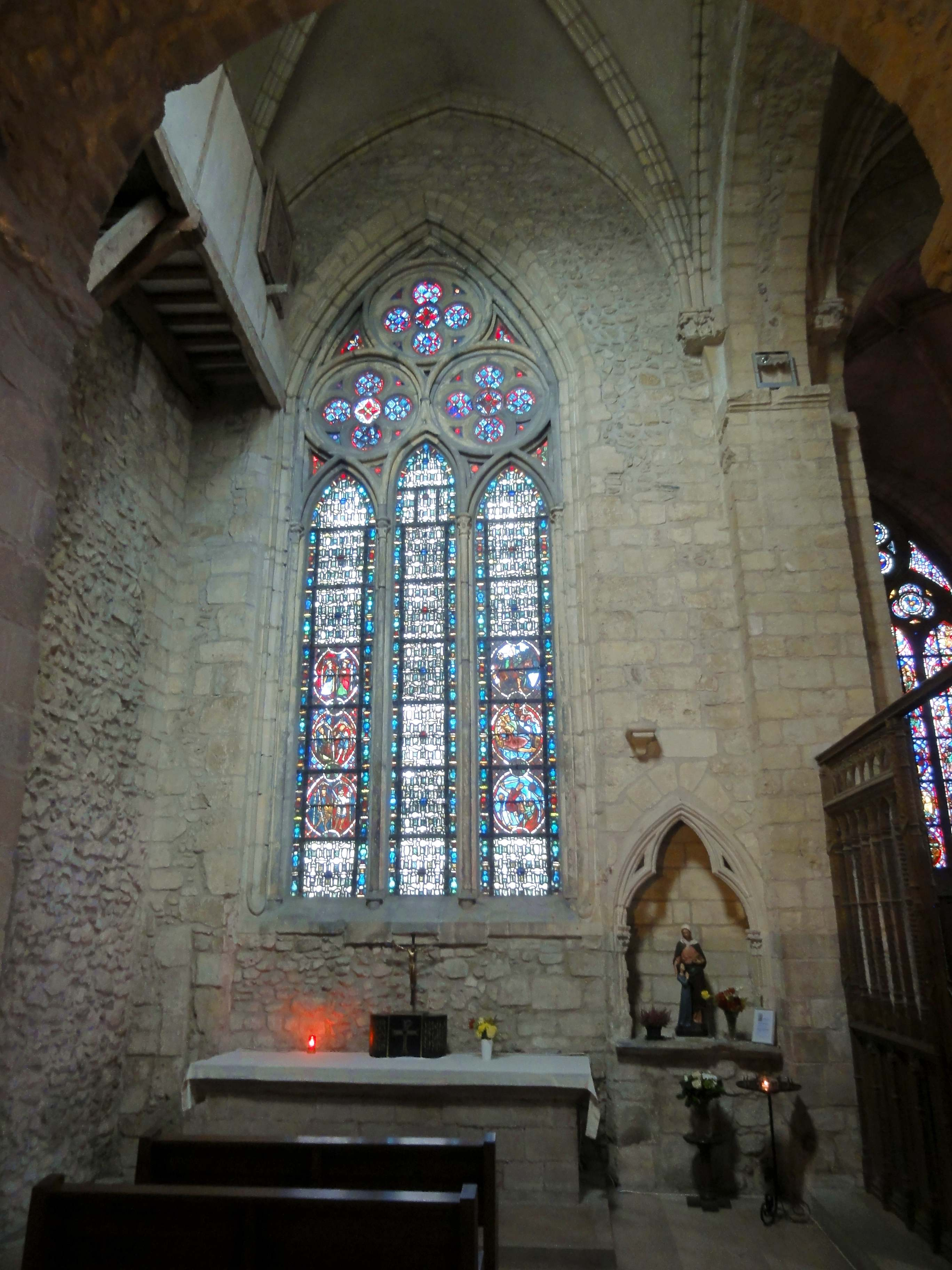 Intérieur de l'église - voir titre.